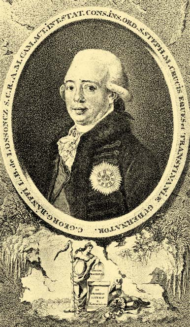 Gróf Bánffy György (1661-1708) az osztrák birodalomhoz csatolt Erdély első főkormányzója (gubernátor). Egykorú metszet után. Körirata: C(omes). GEORG(ius). BANFFI L(iber). B(aro). de LOSSONCZ S(acrae). C(aesareae). R(egiaeque). A(postolicae). M(aiestatis). CAM(erarius). ACT(ualis). INT(imus). STAT(us). CONS(iliarius). INS(ignis). ORD(inis). S(ancti). STEPH(ani). M(agnae). CRVCIS EQVES et TRANSILVANIAE GVBERNATOR. Alul: DACIAE PROCONSULI OB PROMOTAS LITERAS P(er). KOVACHICH.